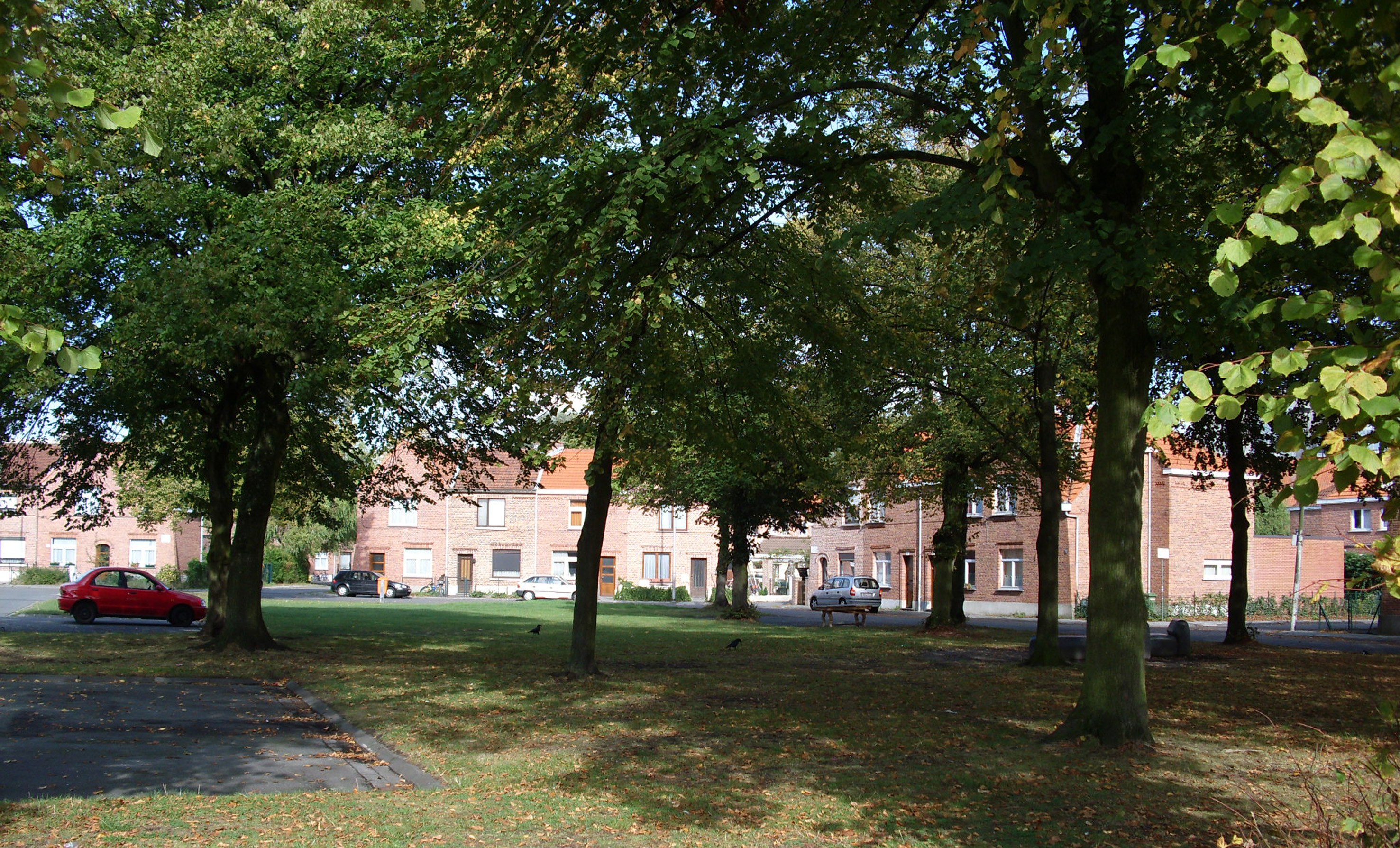 Het Pieter Huyssensplein - Steenakker - Gent - Oost-Vlaanderen - Vlaanderen - België